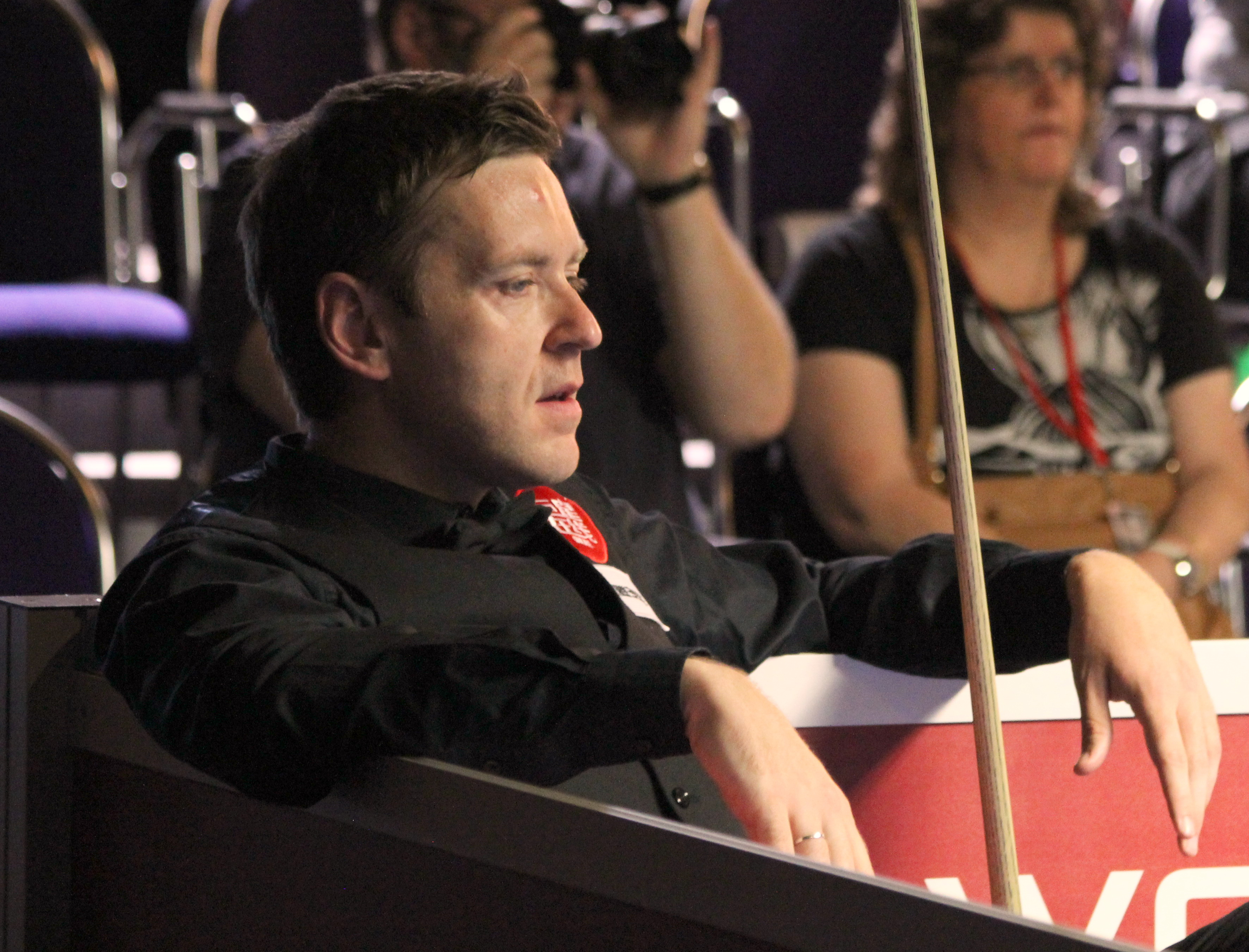 Ricky Walden beim Paul Hunter Classic 2016